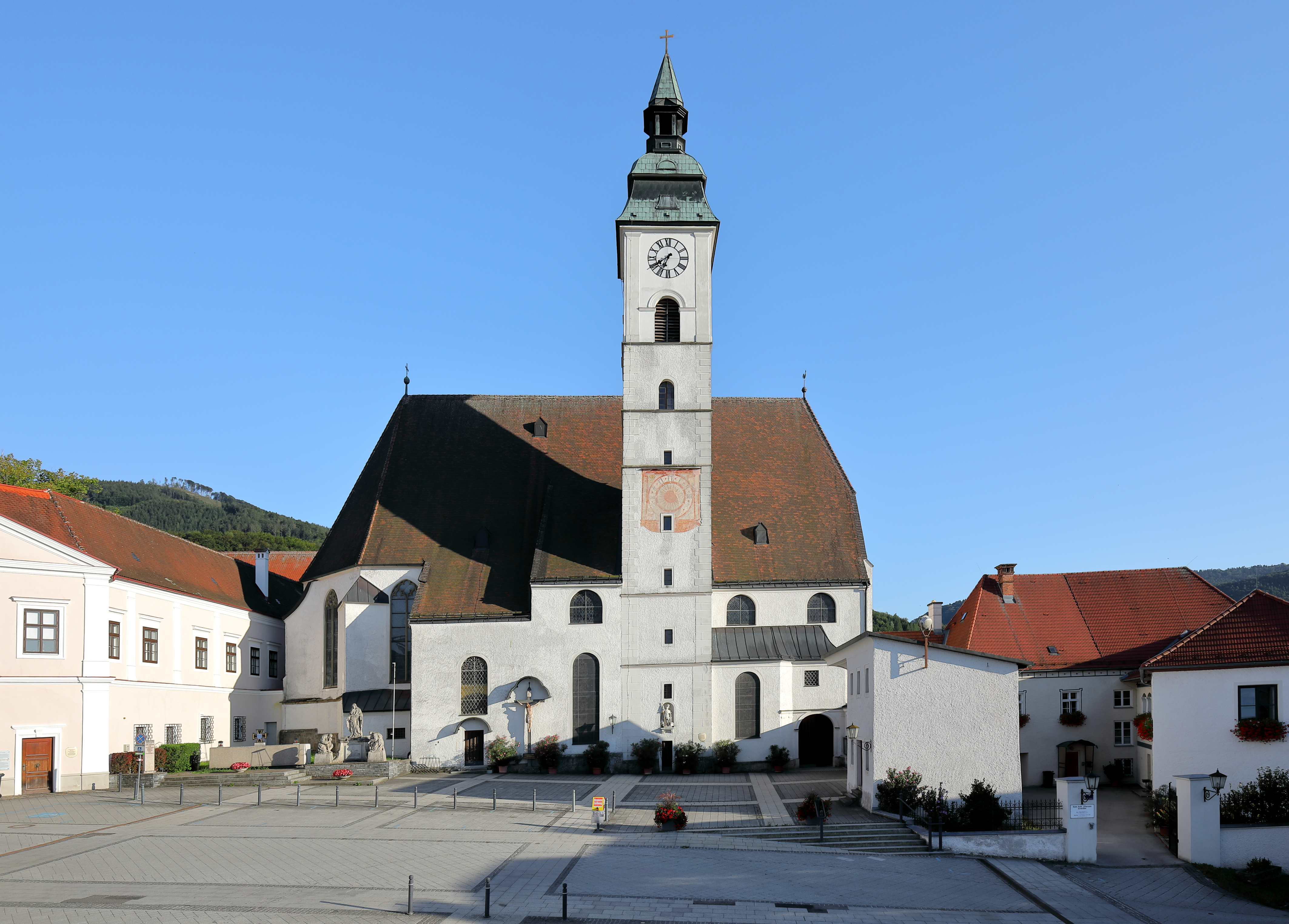 Nordansicht der röm.-kath. Pfarrkirche hl. Maria Magdalena der niederösterreichischen Stadtgemeinde Scheibbs.Eine Hallenkirche in erhöhter Lage an der Südfront des Rathausplatzes, die Anfang des 16. Jahrhundert unter Einbeziehung des Kirchturms der Vorgängerkirche errichtetet wurde. 1609 und 1839 erfolgte eine Turmerhöhung. 1627 bis 1637 sowie nach einem Brand 1645 erfolgten An- und Umbauarbeiten statt und eine sukzessive Barocksierung statt.